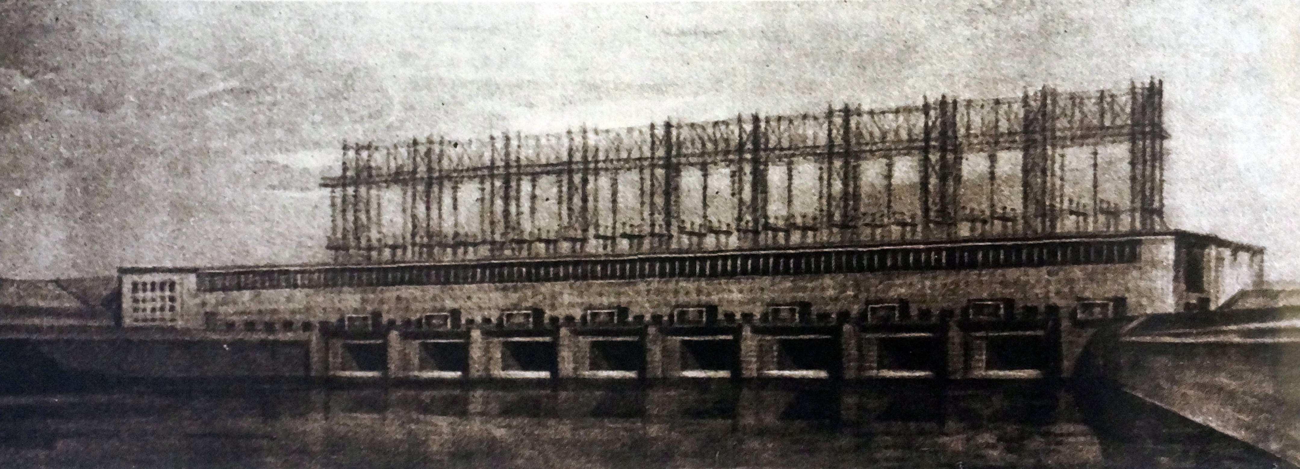 Перспектива Переволокской ГЭС с нижнего бьефа. Ранний проект Жигулёвского гидроузла